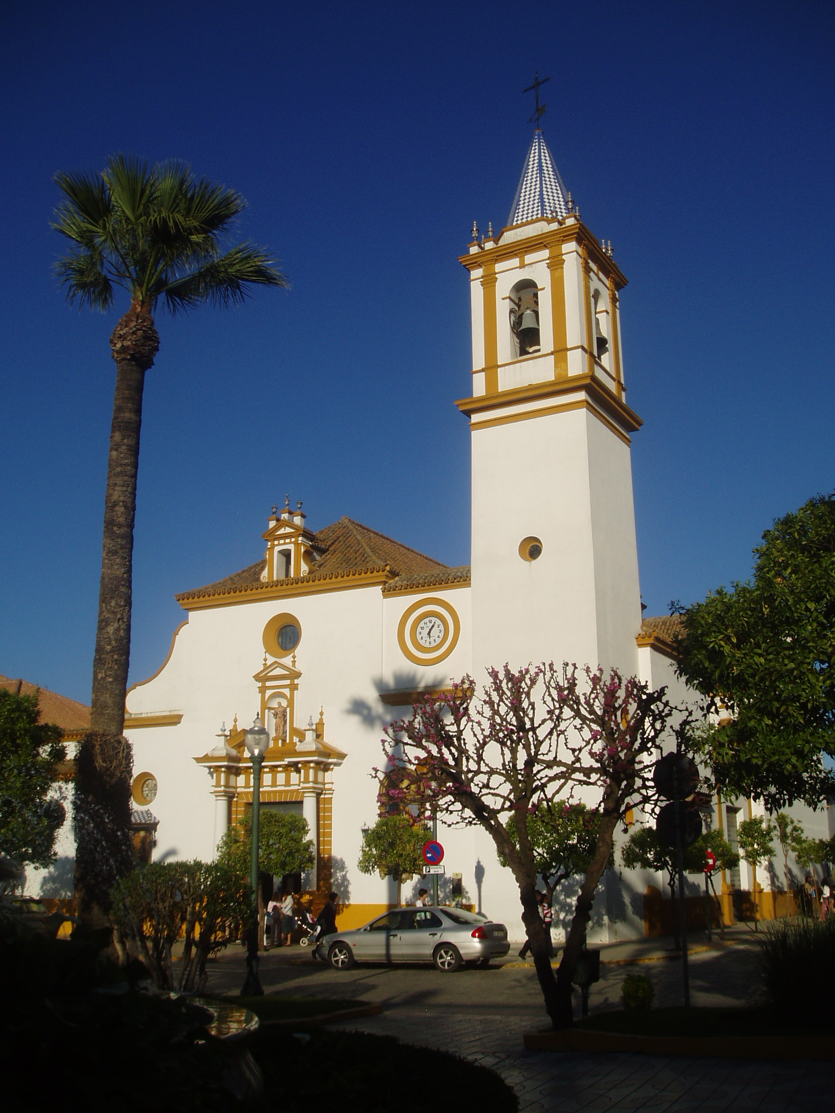 Parroquia de Santa maría Magdalena, iglesia principal de Dos Hermanas Sevilla